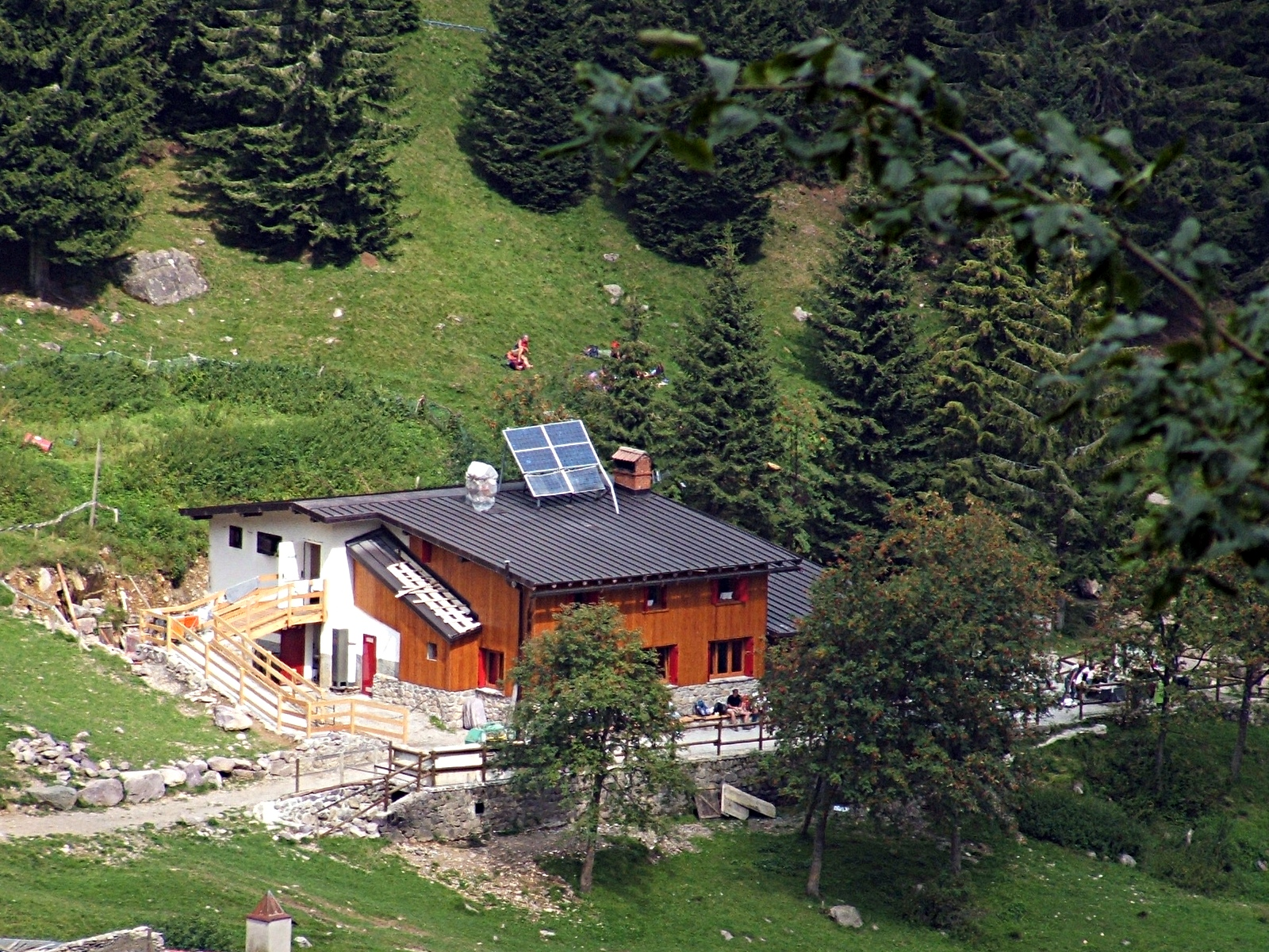 Rifugio Alpe Corte, Valcanale di Ardesio, Bergamo, Italy